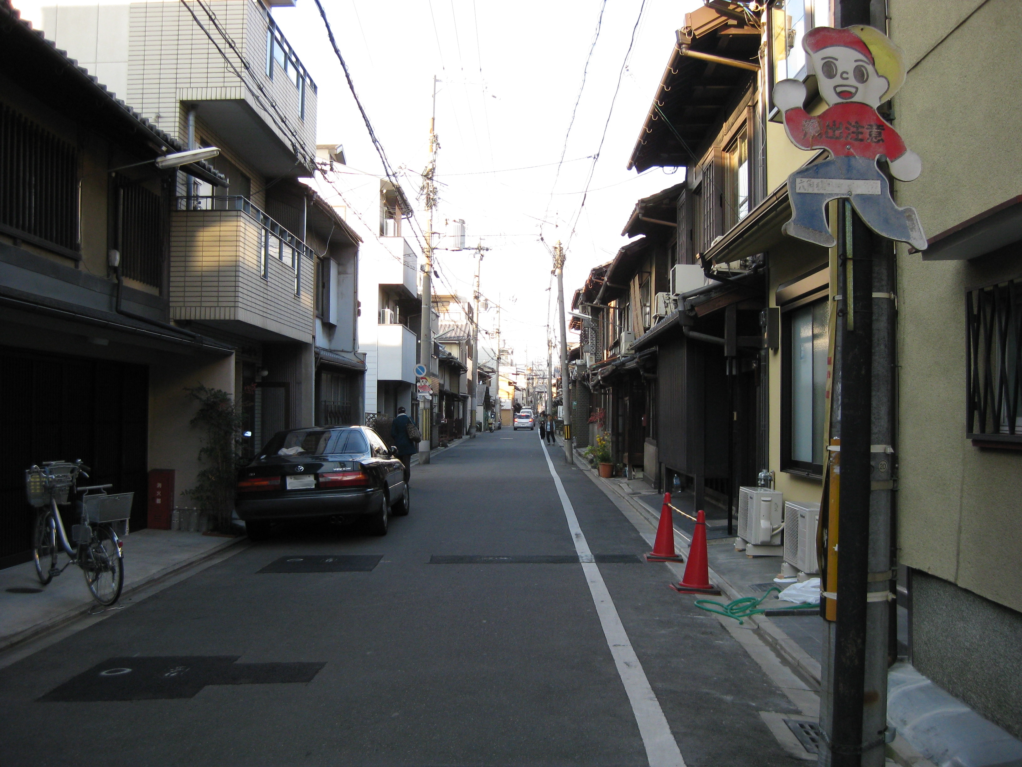 猪熊通 京都市中京区 蛸薬師通から北方面